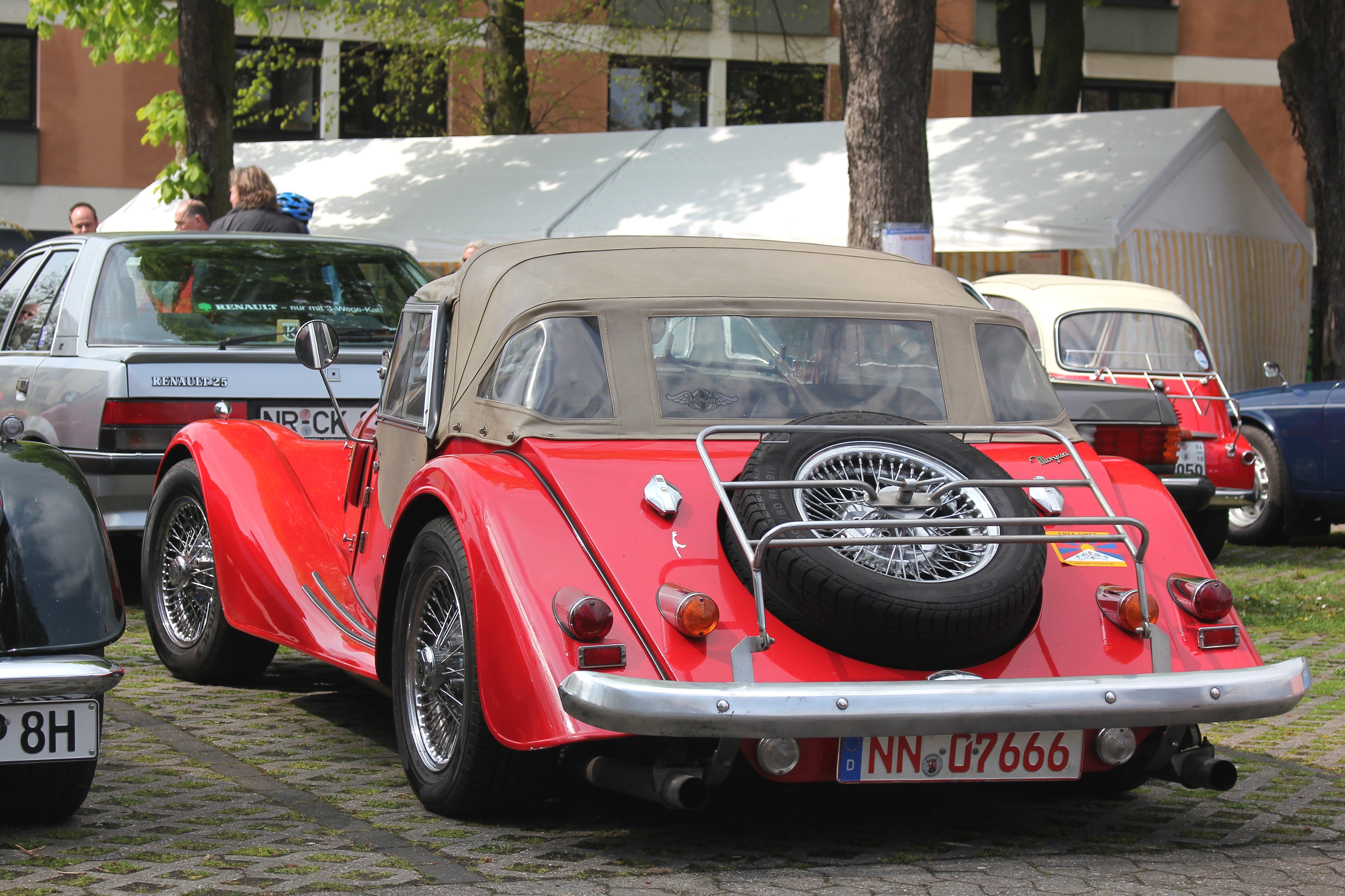 Morgan Plus 8, Baujahr 1983, Speichenräder nicht serienmäßig (fiktives Kennzeichen)